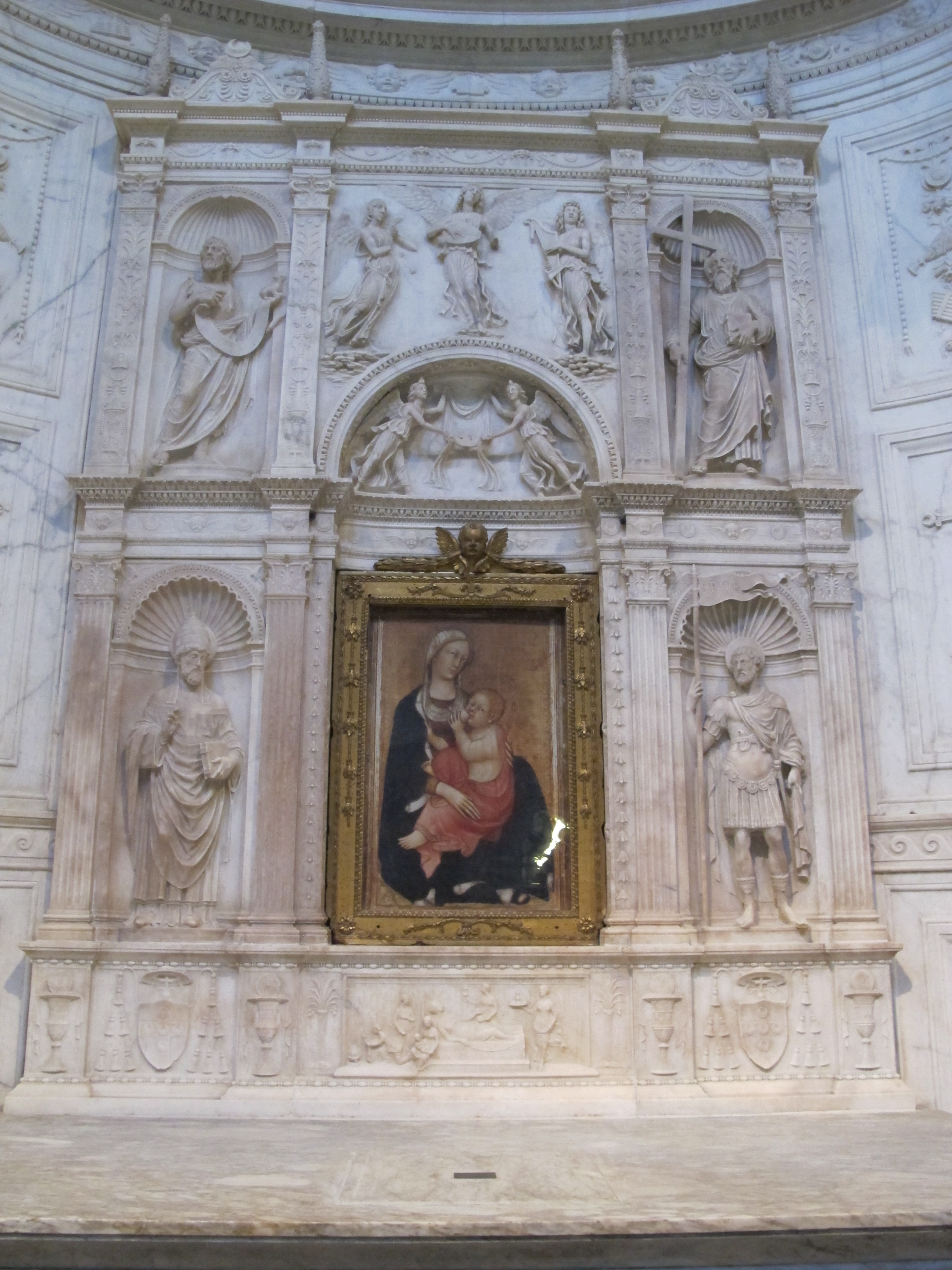 Altare piccolomini 03 madonna di giovanni di cecco